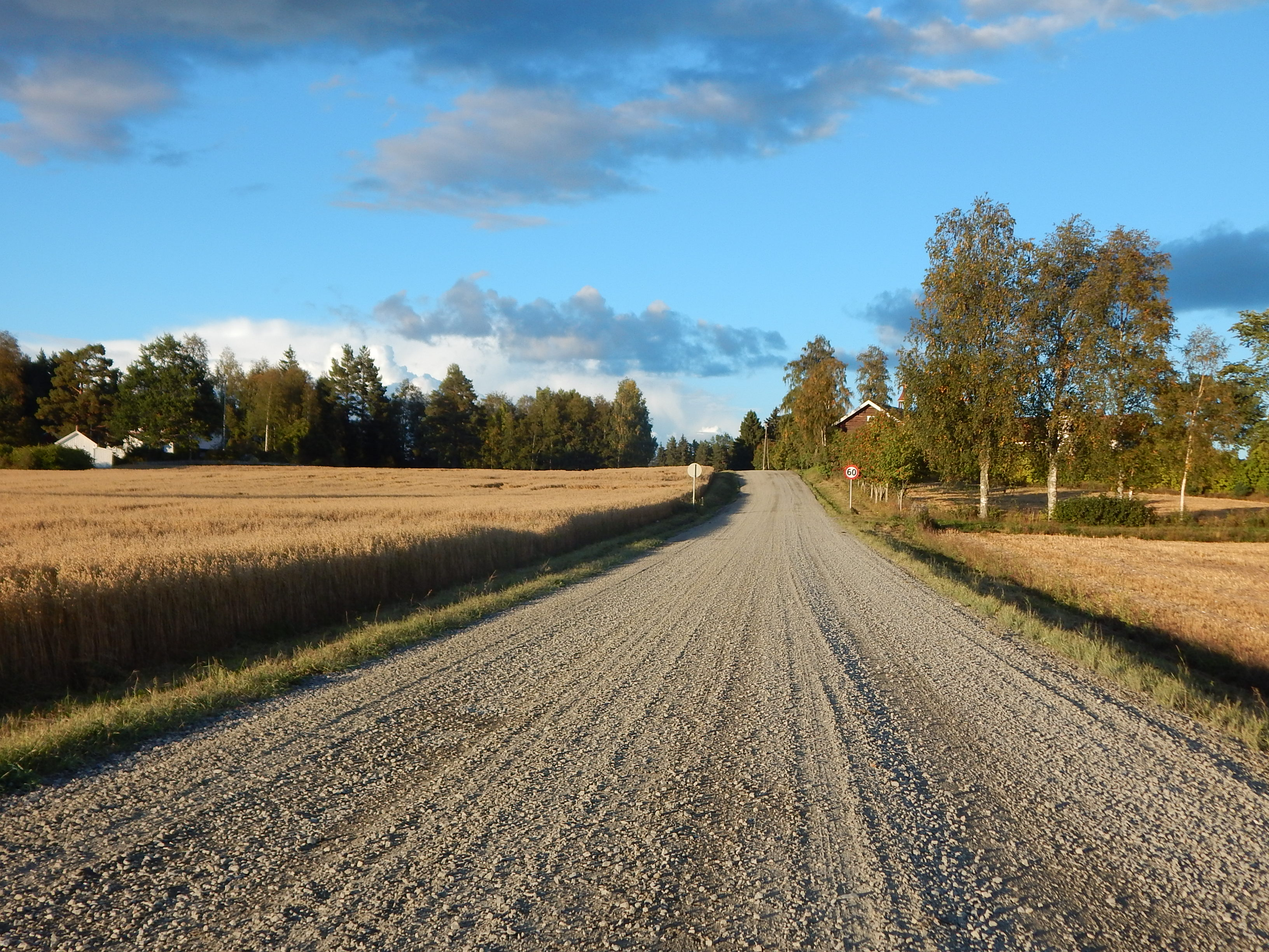 Odals Verk-vegen (fylkesvei 1952, tidl. 296)